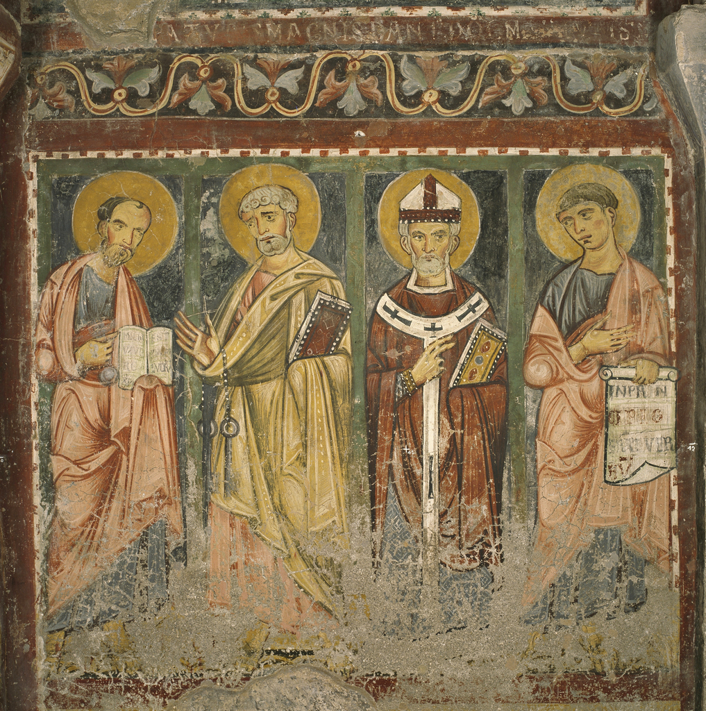 Cattedrale di Anagni - Affreschi